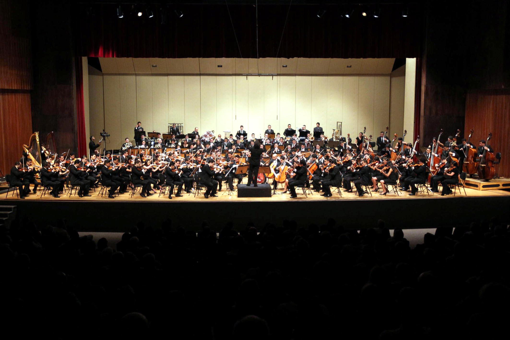 Governador Jaques Wagner prestigia a Orquestra Simón Bolívar da Venezuela no Teatro Castro Alves (TCA). Foto: Manu Dias/SECOM